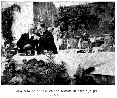 Cristóbal Jiménez Encinas